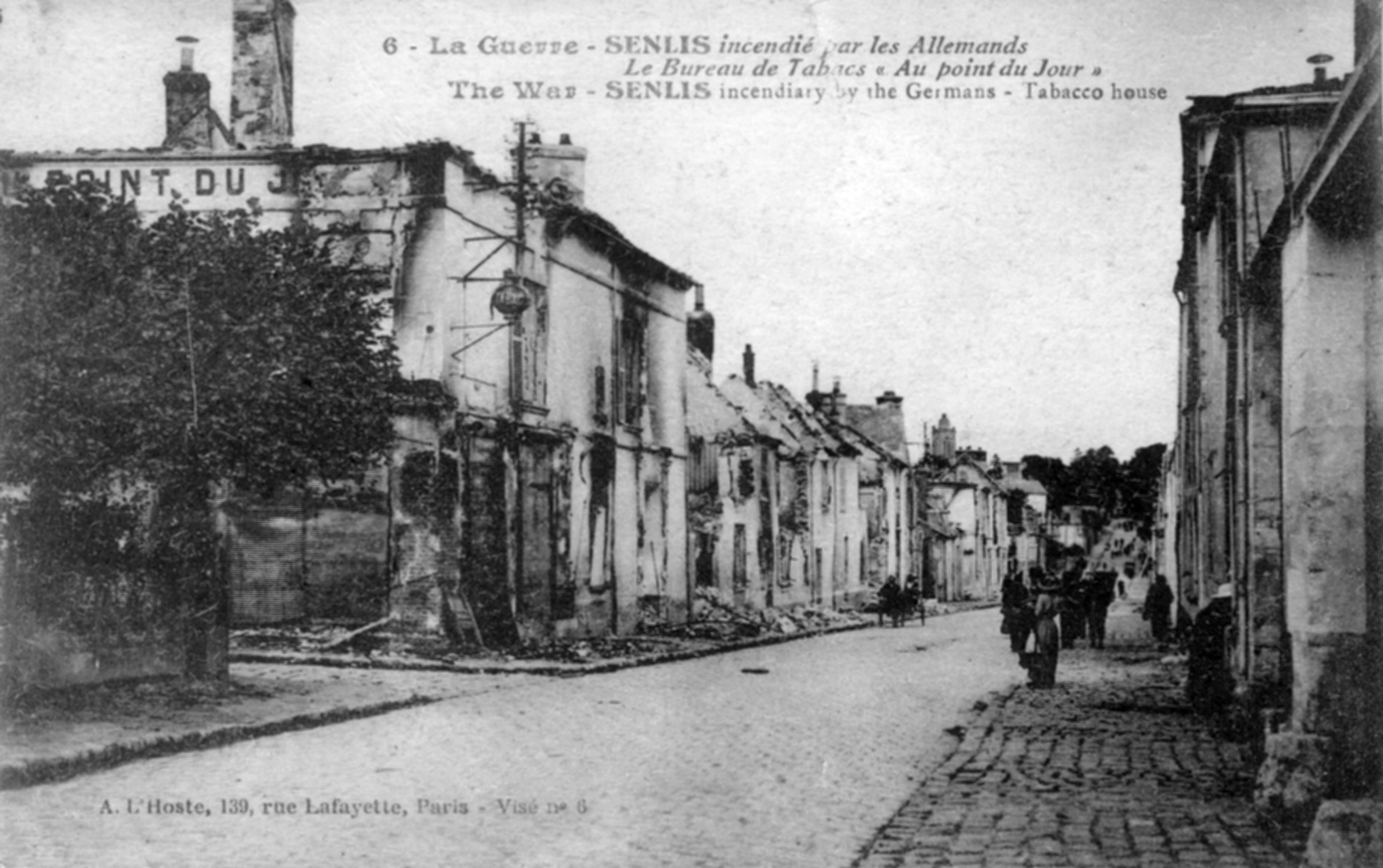 Senlis incendié par les Allemands. Le bureau de tabacs "Au point du jour" A. L'Hoste - 139, rue Lafayette - Paris - visé n° 6